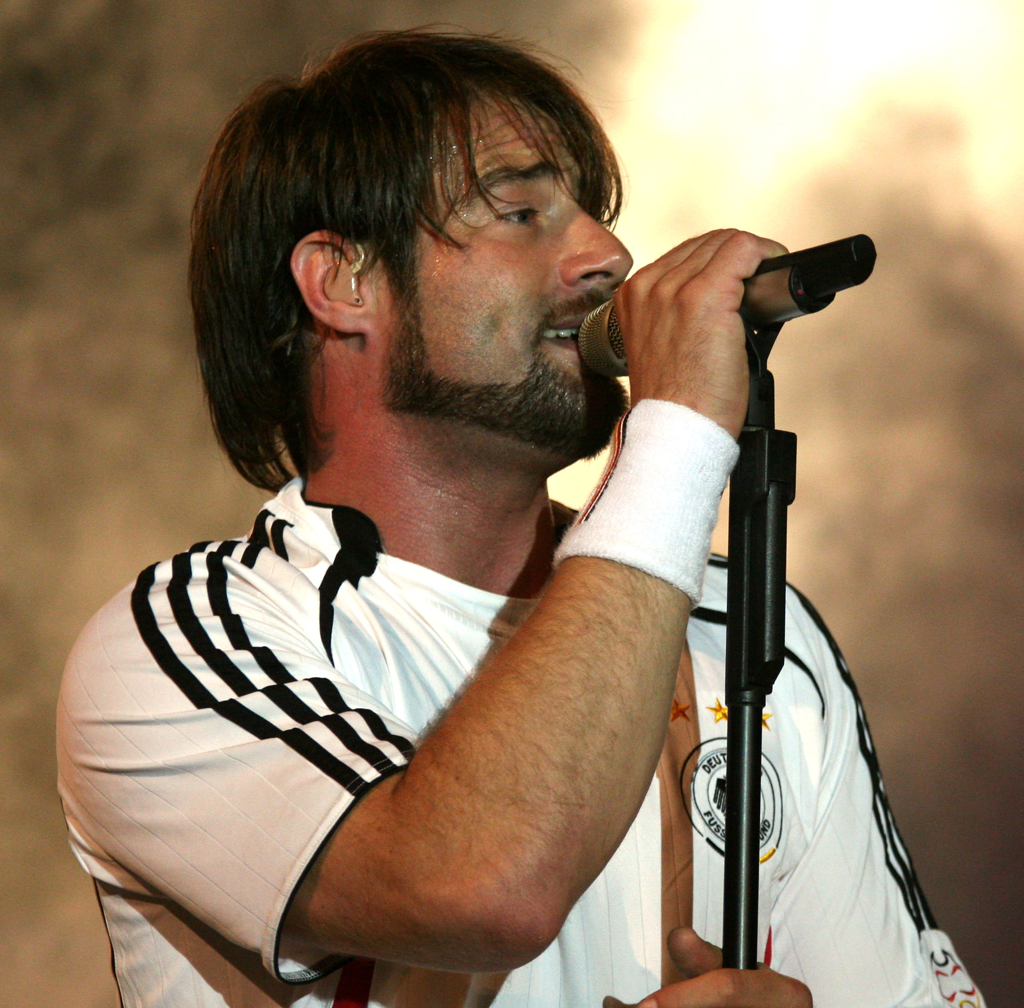 Sasha; deutscher Popsänger; fotografiert anlässlich des WM-Public Viewings auf dem Schlossplatz in Stuttgart.